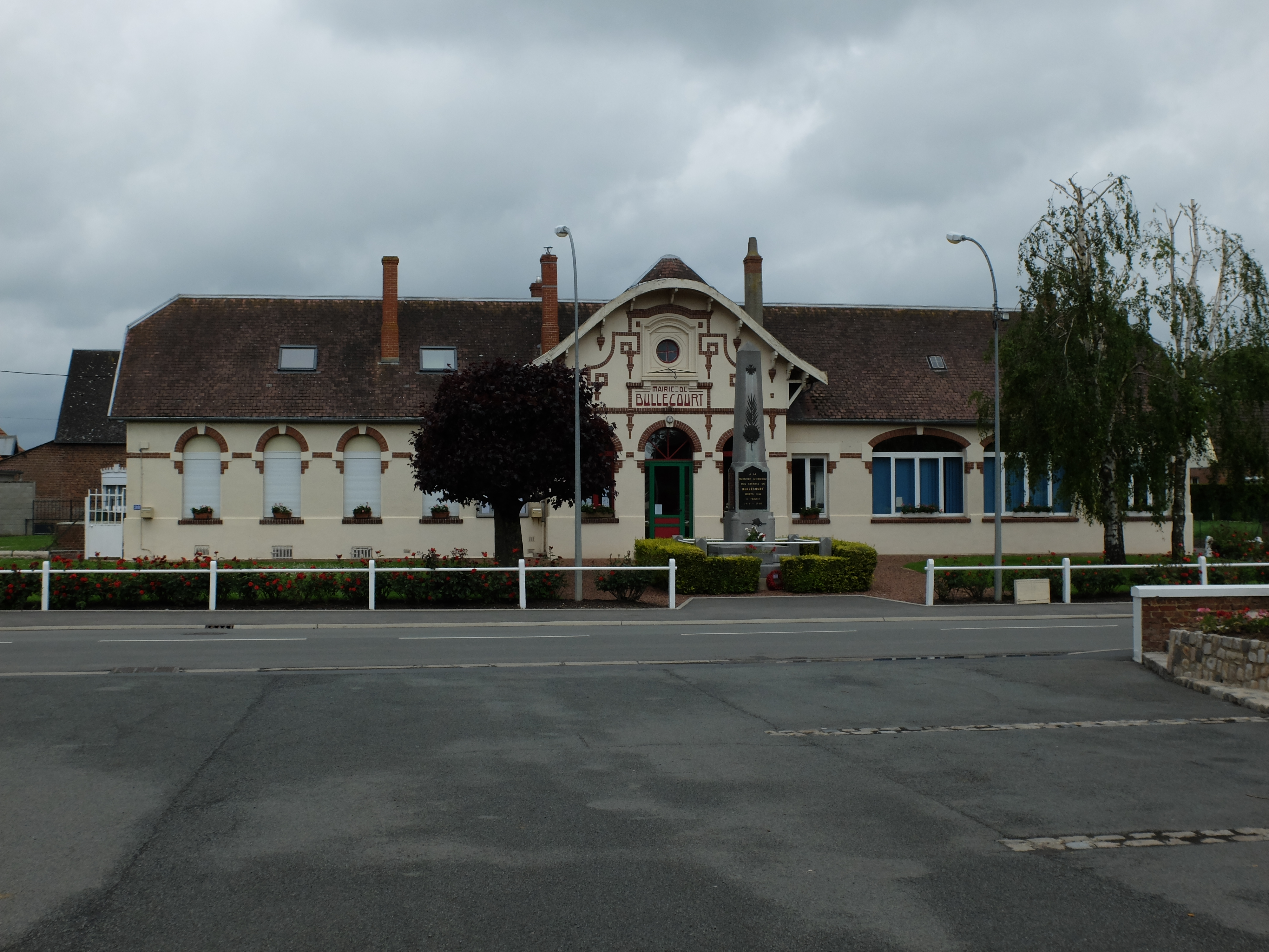 Vue de la mairie et du monument aux morts de Bullecourt